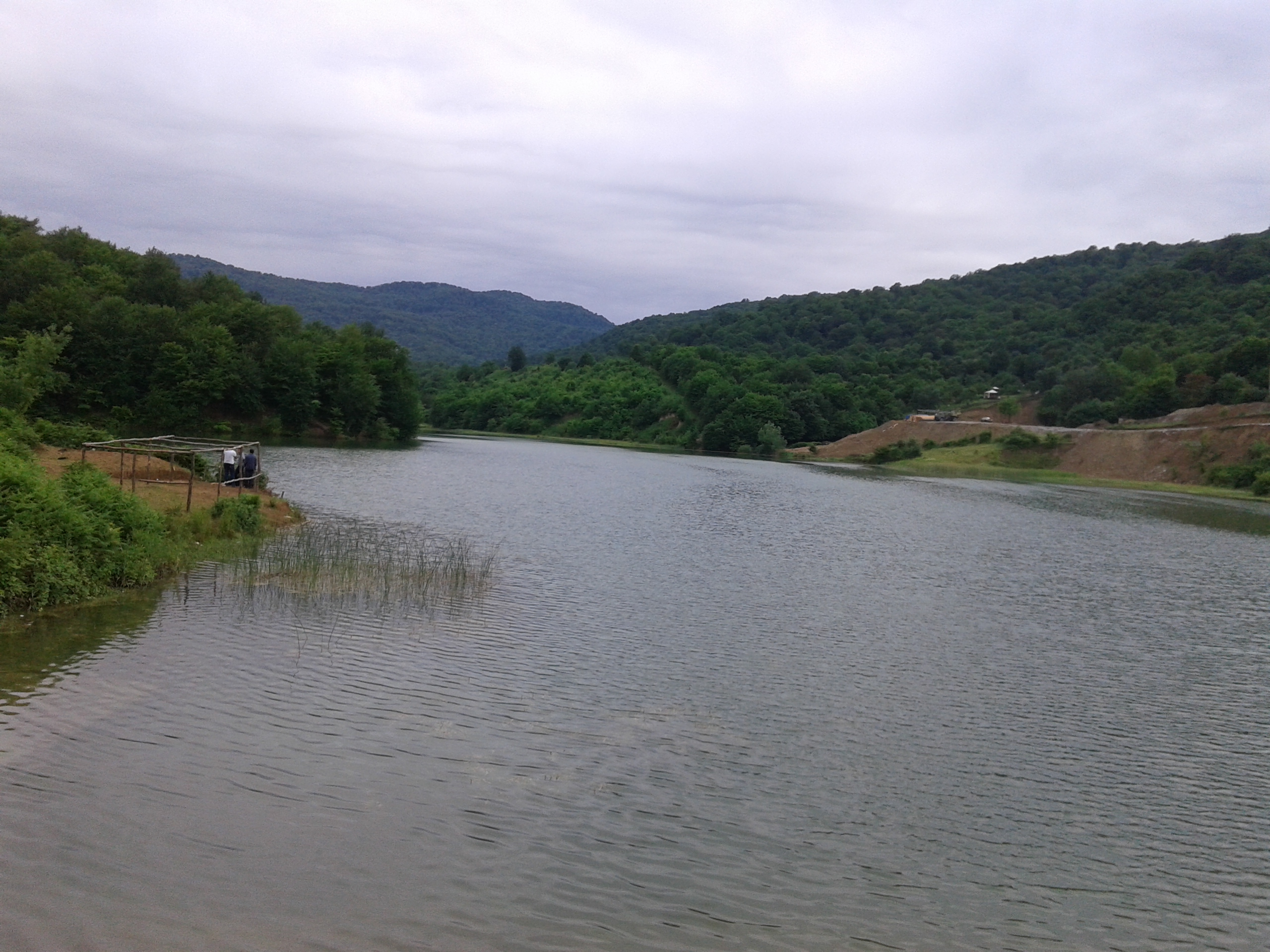 Çənlibelgölü